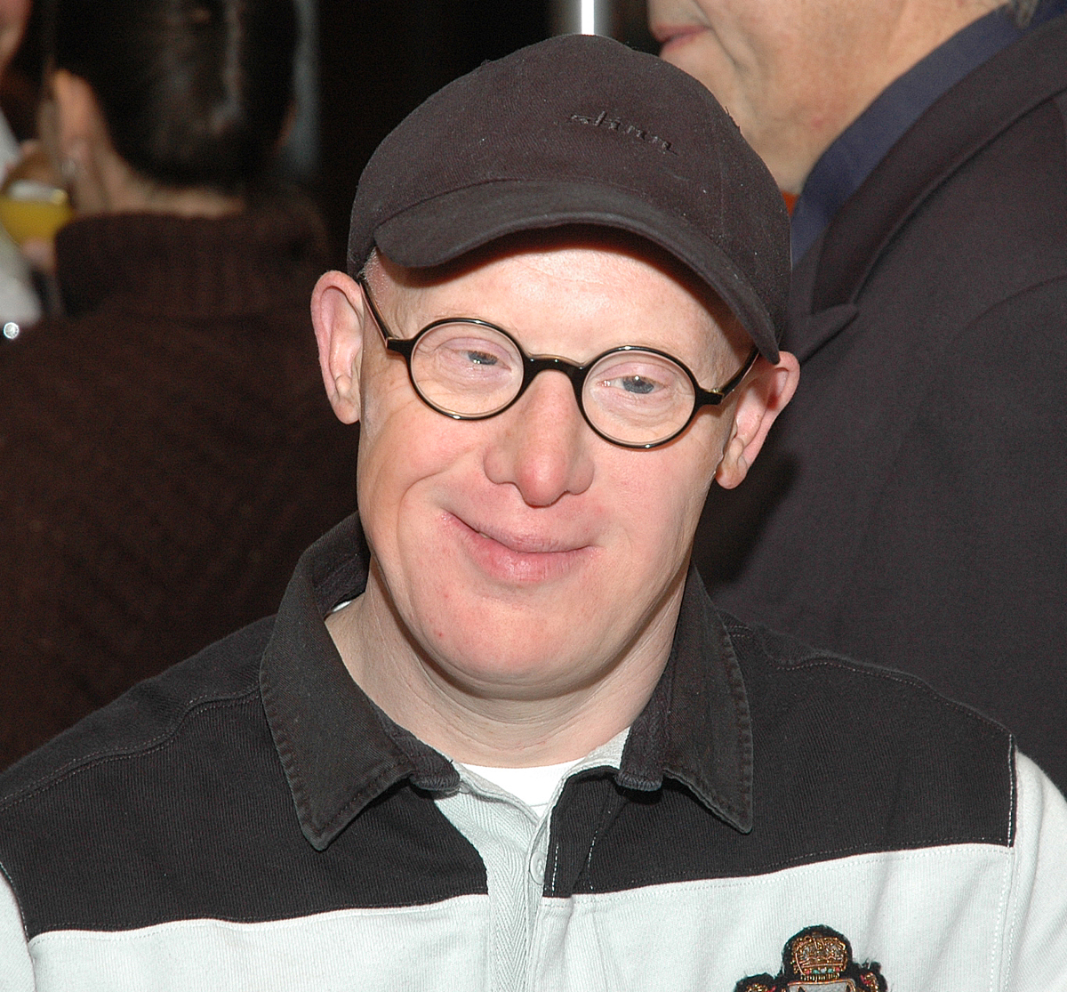 Rolf (Bobby) Brederlow bei einem Künstlerempfang im Gasteig in München